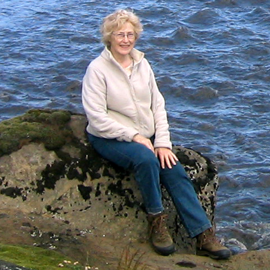 Elsa G. Vilmundardóttir á bökkum Múlakvíslar sumarið 2004